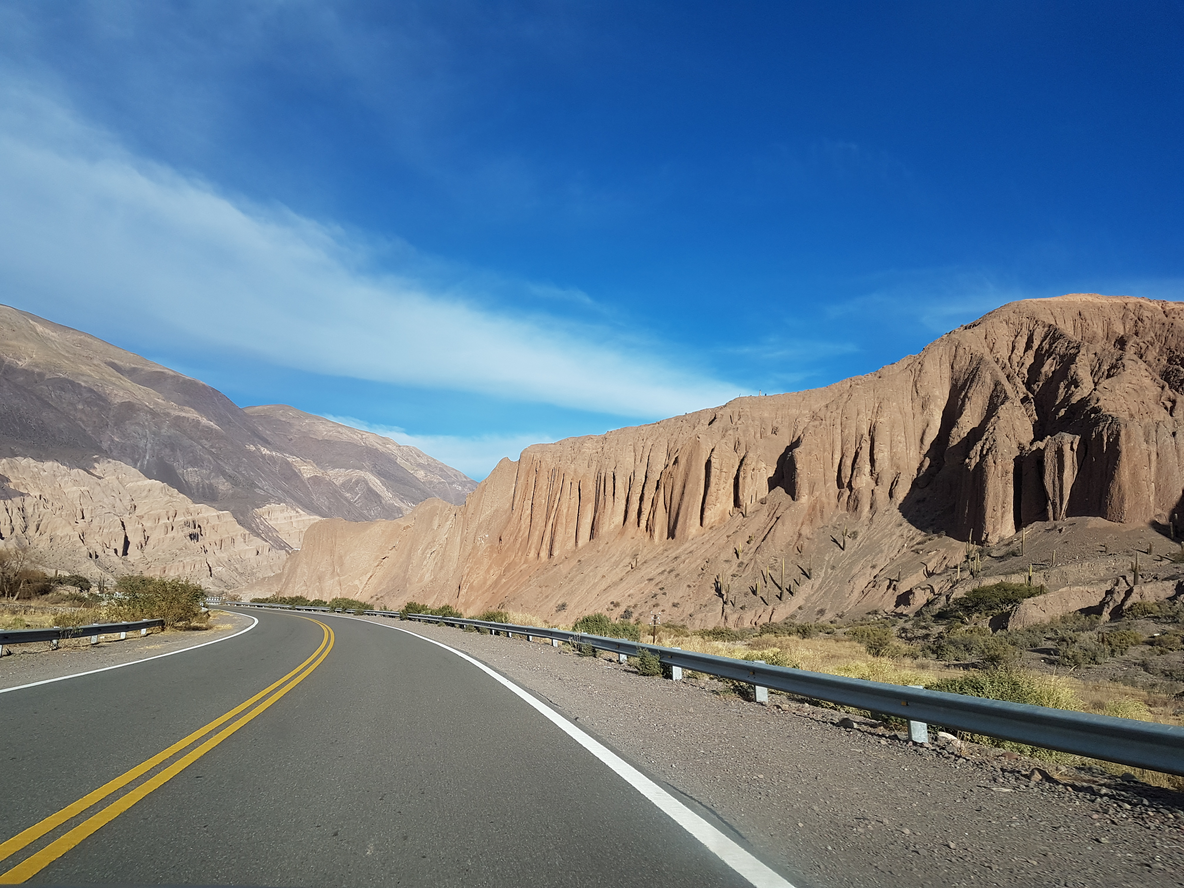 monumento natural. lugares